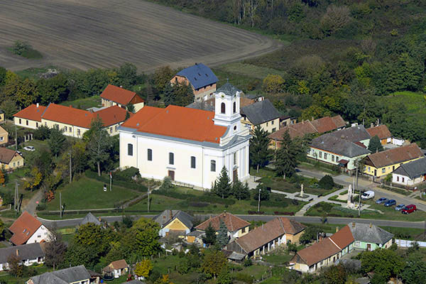 Légi fotó, Kóka